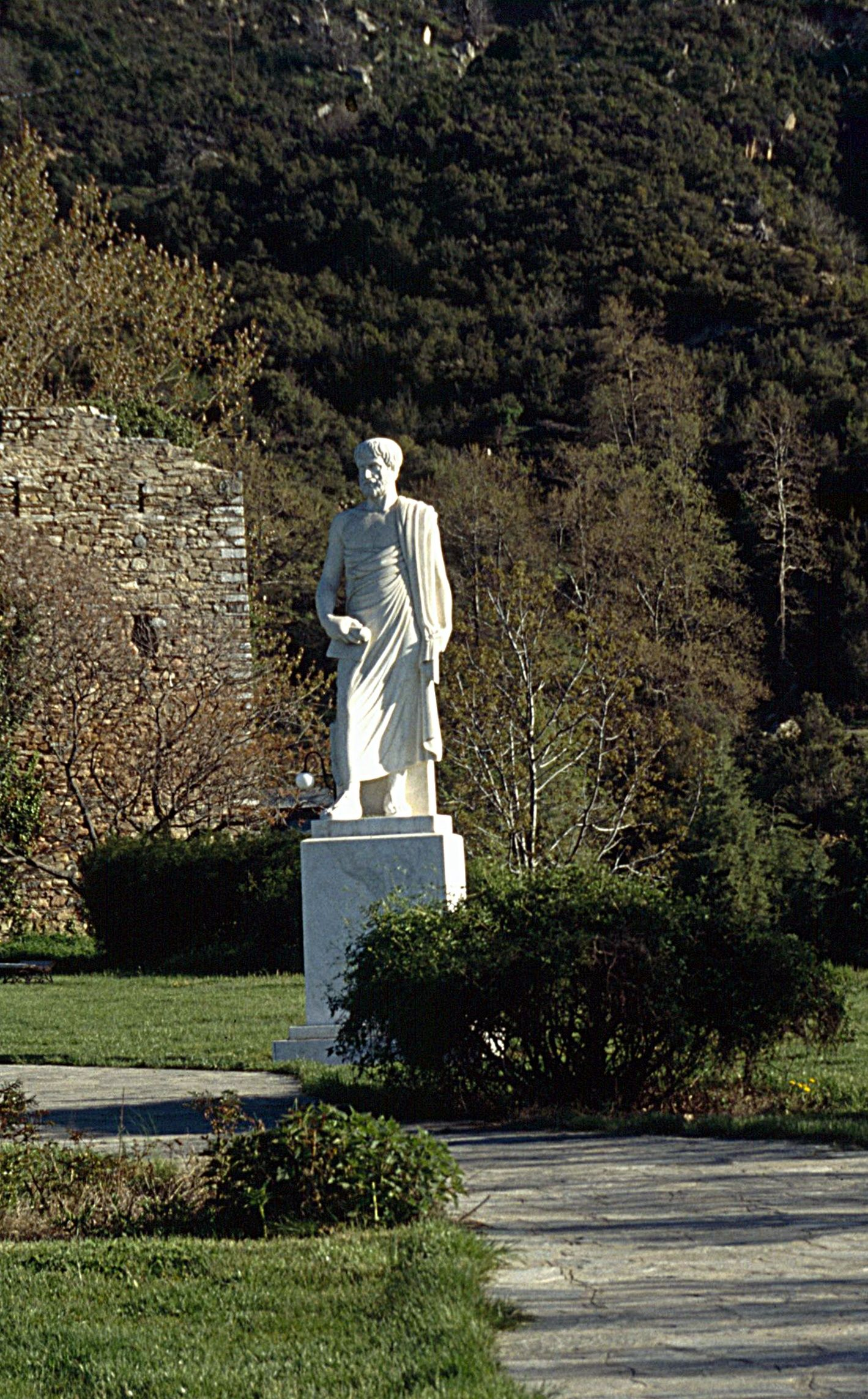 Aristoteles-Statue in Stagira